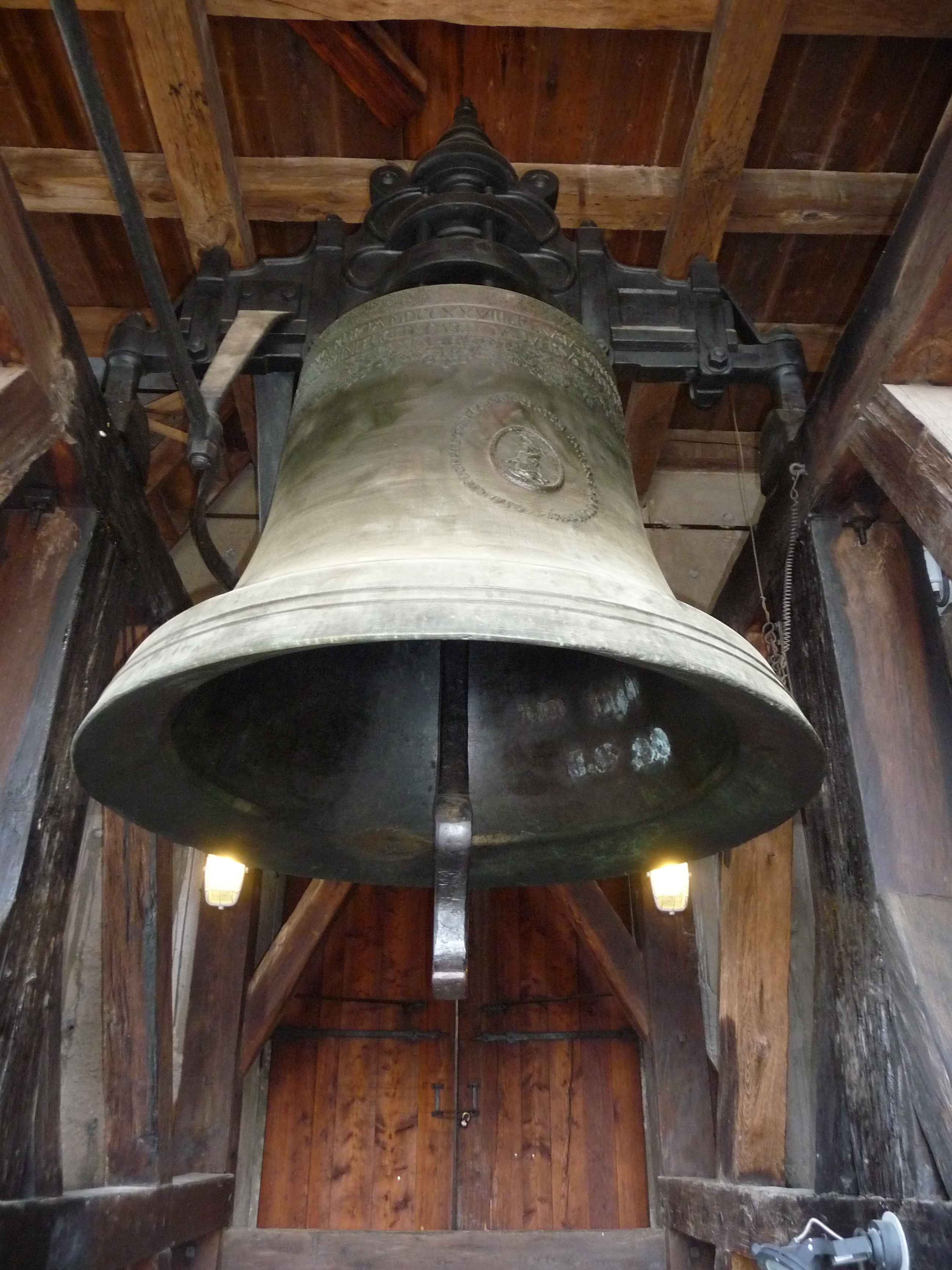 cca 4500 kg 180 cm gis-as/0